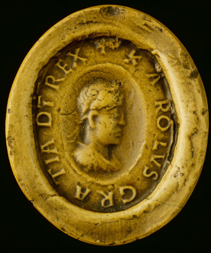 Moulage du sceau de Charles II le Chauve, roi de France. Légende en latin restituée : "KAROLUS GRATIA DEI REX", Traduction : Charles, roi par la grâce de Dieu.